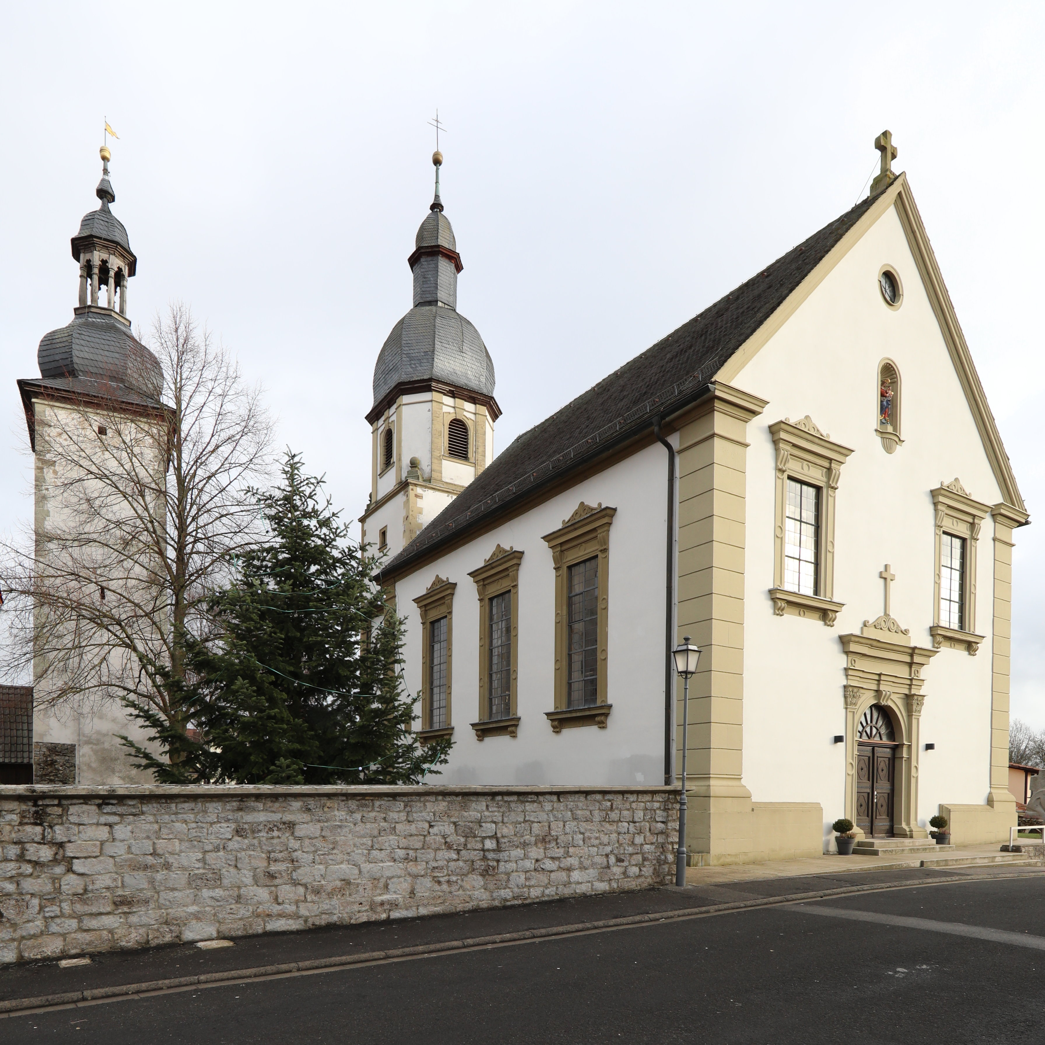 katholische Pfarrkirche St. Nikolaus in Mechenried